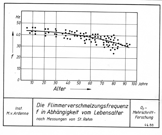 Ergebnisse der Untersuchungen der Flimmerverschmelzungsfrequenz in Abhängigkeit vom Lebensalter, eigene Arbeit.